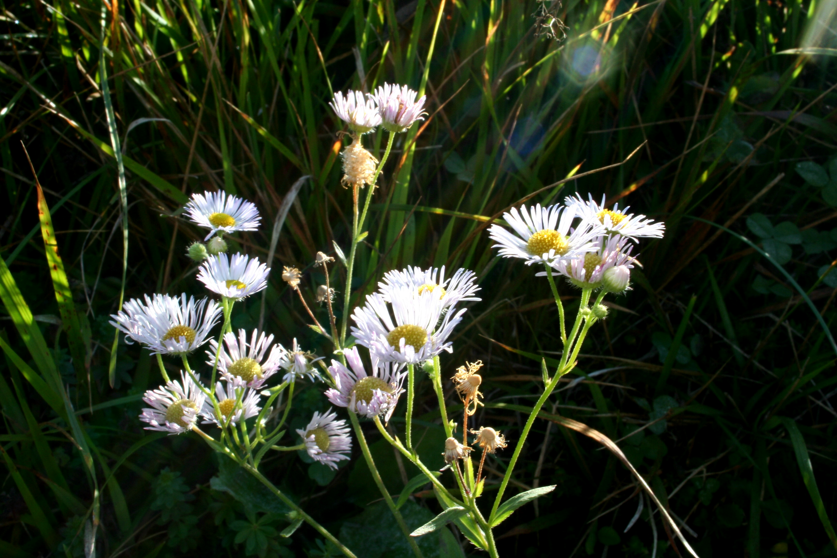 Erigeron_annuus_subsp._septentrionalis (Cespica annua)